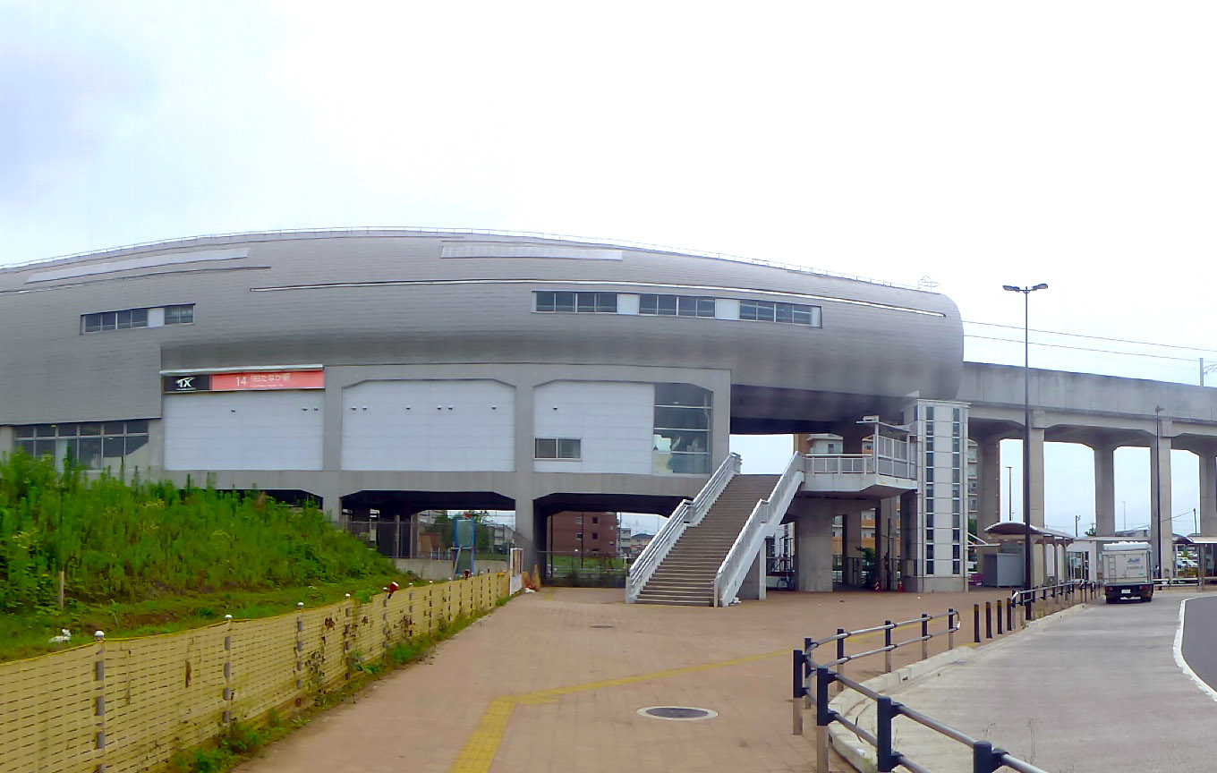 柏たなか駅 (Kashiwa-Tanaka Station)